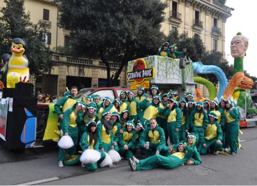 Il carro 2011 del gruppo "Butei De Domeiara"